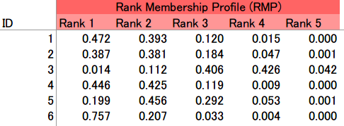 RMP of Latent Rank Theory